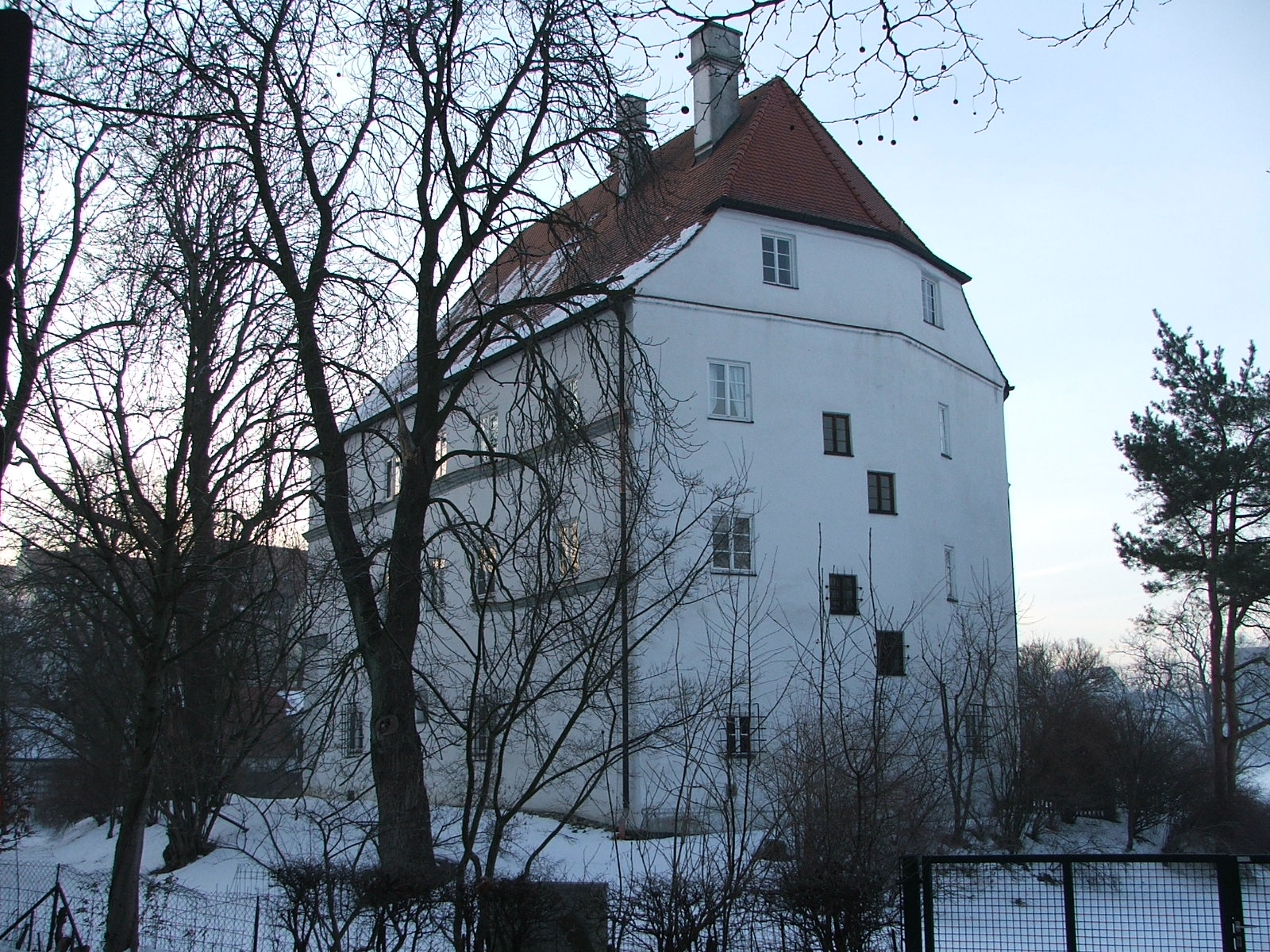 Schloss Asch in MoosburgSchloss Asch